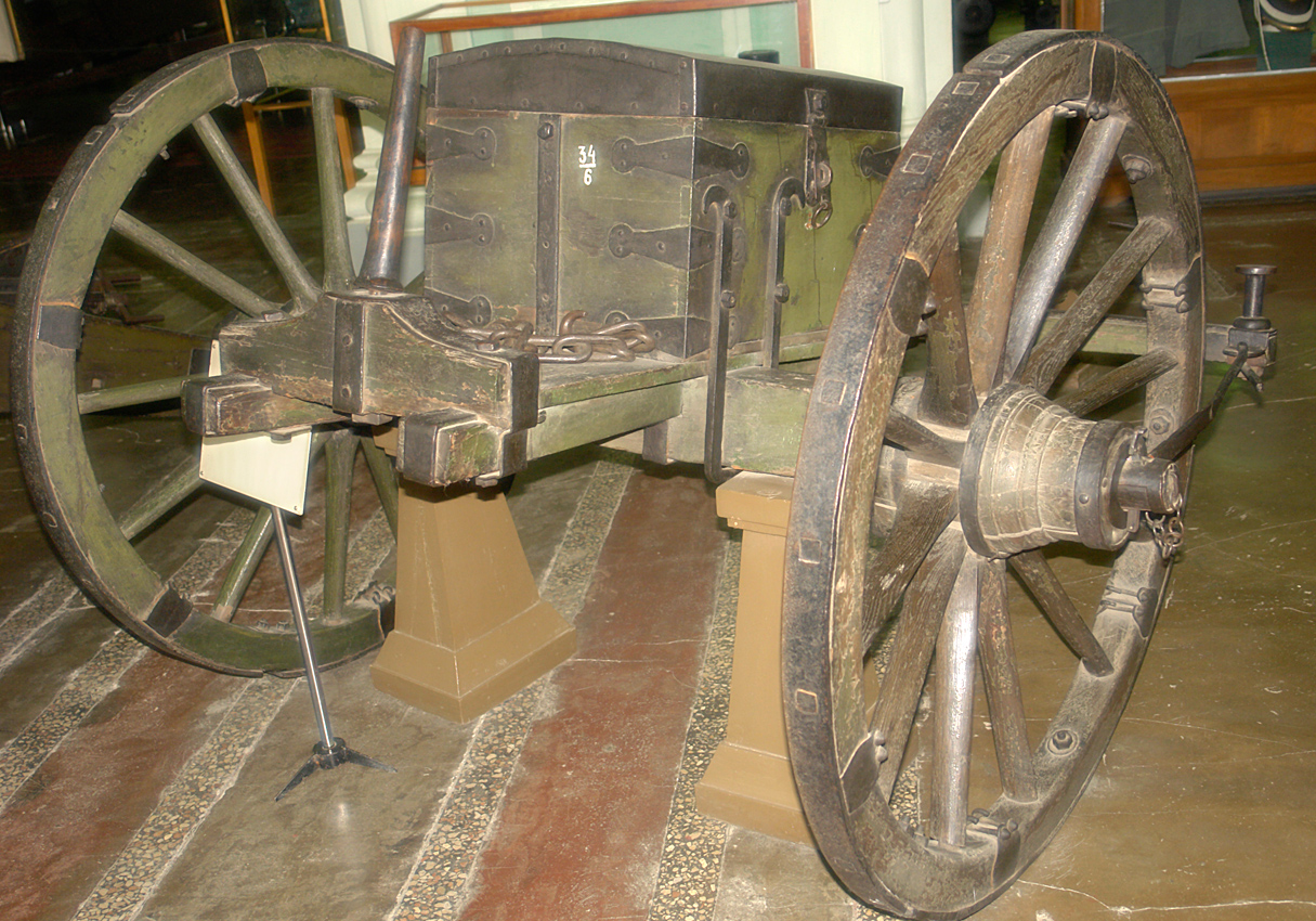 Полевой лёгкий передок образца 1805 года. Изготовлен в первой четверти XIX века. Применялся для перевозки лёгки и конных орудий полевой артиллерии, а также для перевозки боеприпасов. Военно-исторический музей артиллерии, инженерных войск и войск связи, Санкт-Петербург. moonspeek: Field light limber, 1805. Made in first quarter of 19th century. Used to transport light and mounted weapon of field artiller and ammunition. Artillery museum (Saint Petersburg).